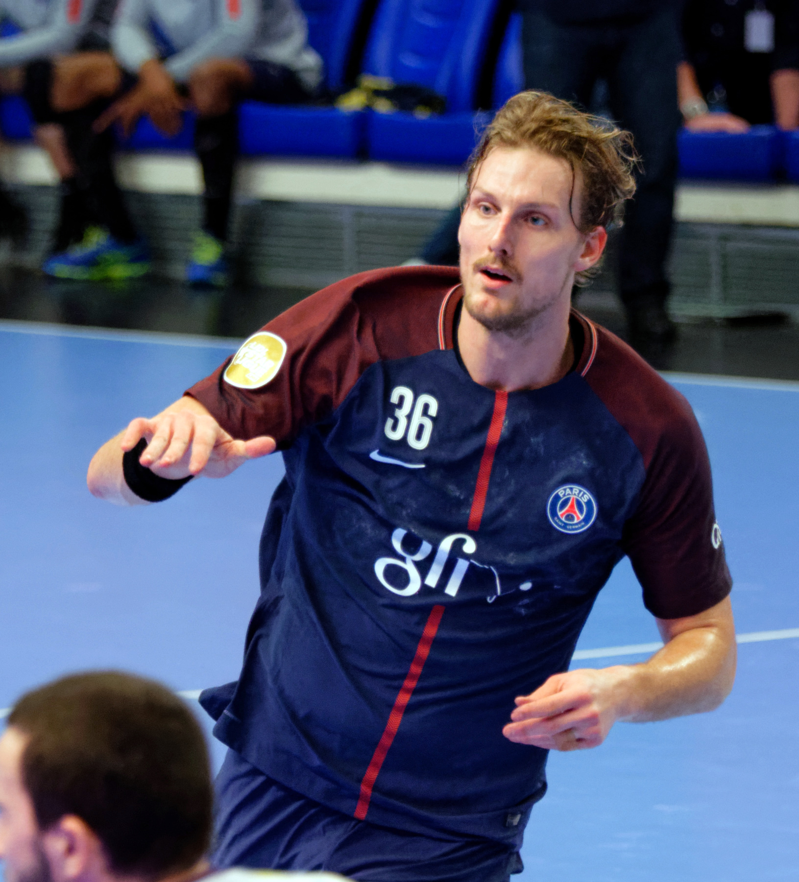 quart de finale de la coupe de la ligue entre le PSG Handball et Nantes. A Coubertin, le 14 décembre 2017.